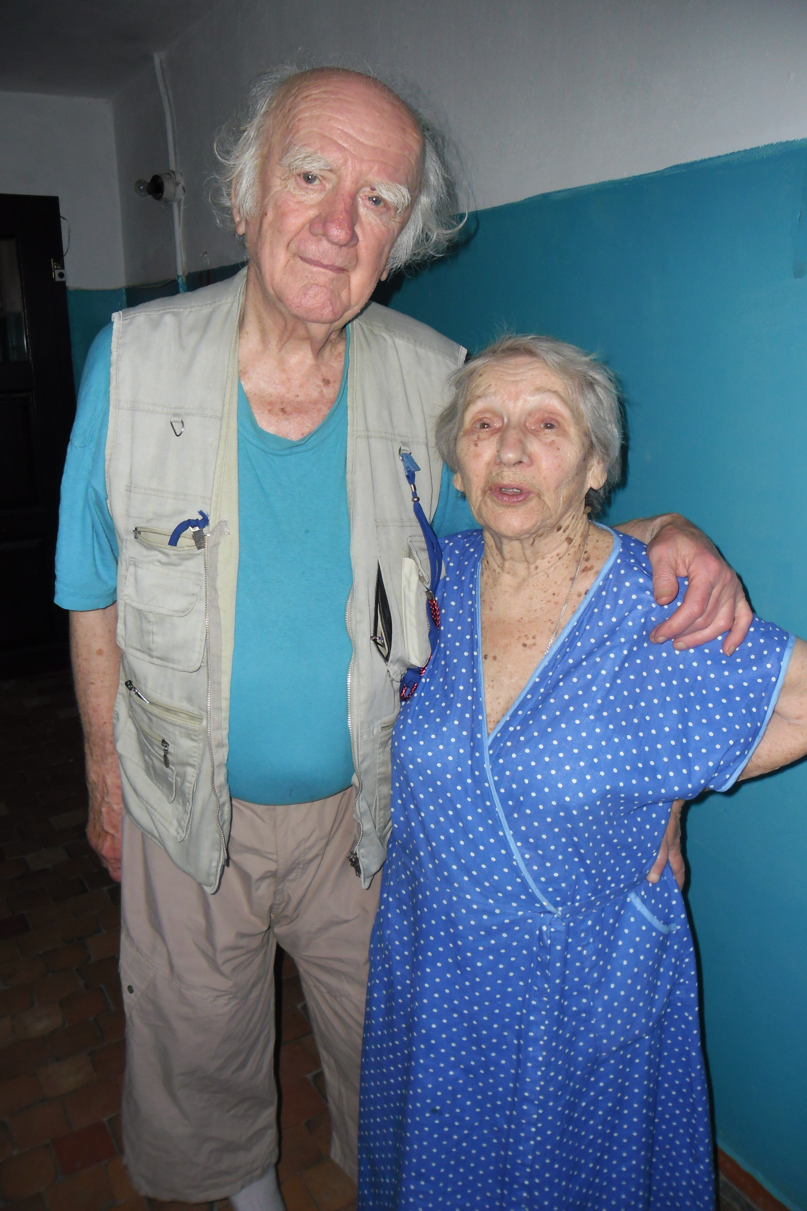 Фото